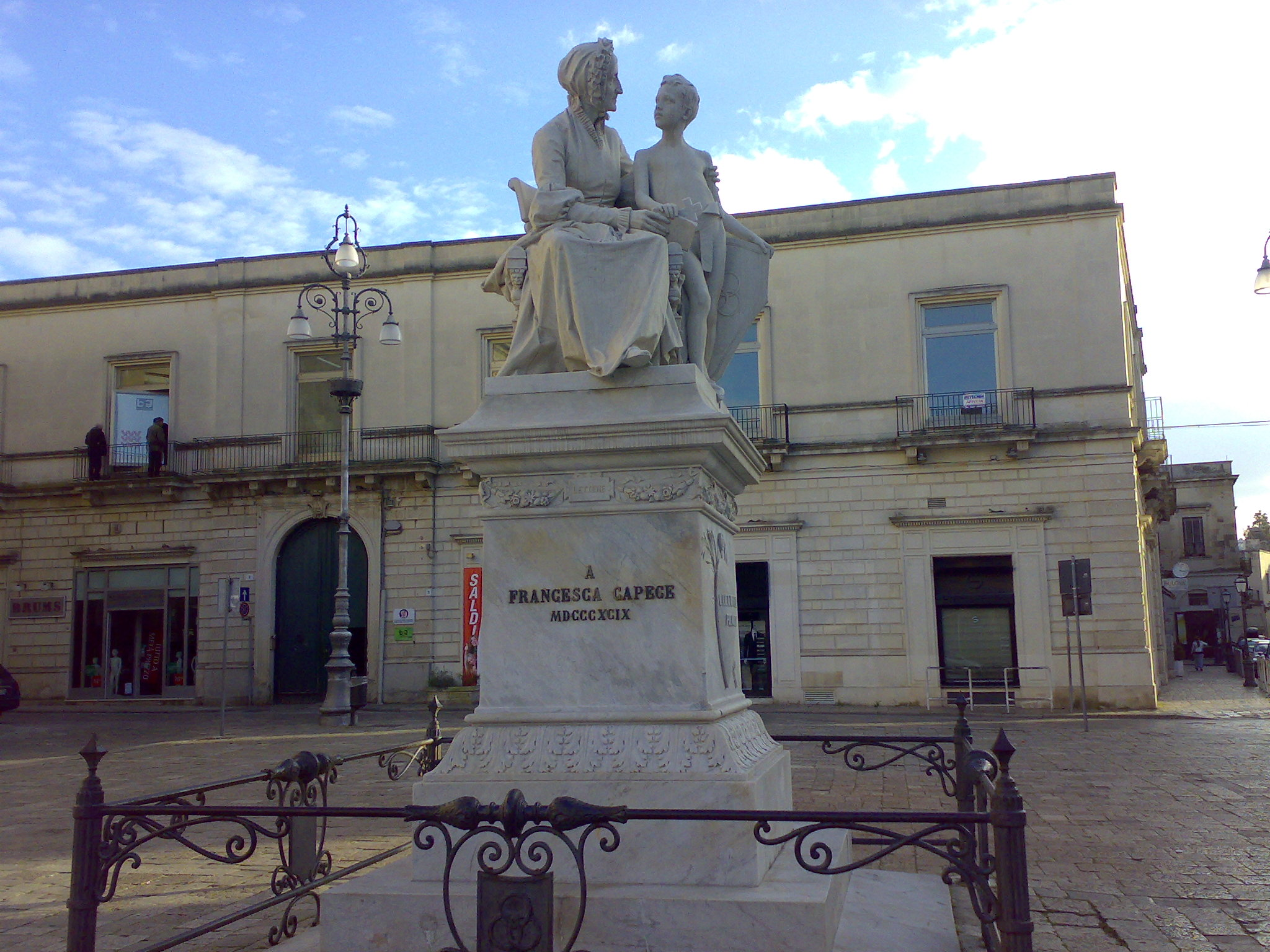 Monumento a Francesca Capece Maglie, provincia di Lecce